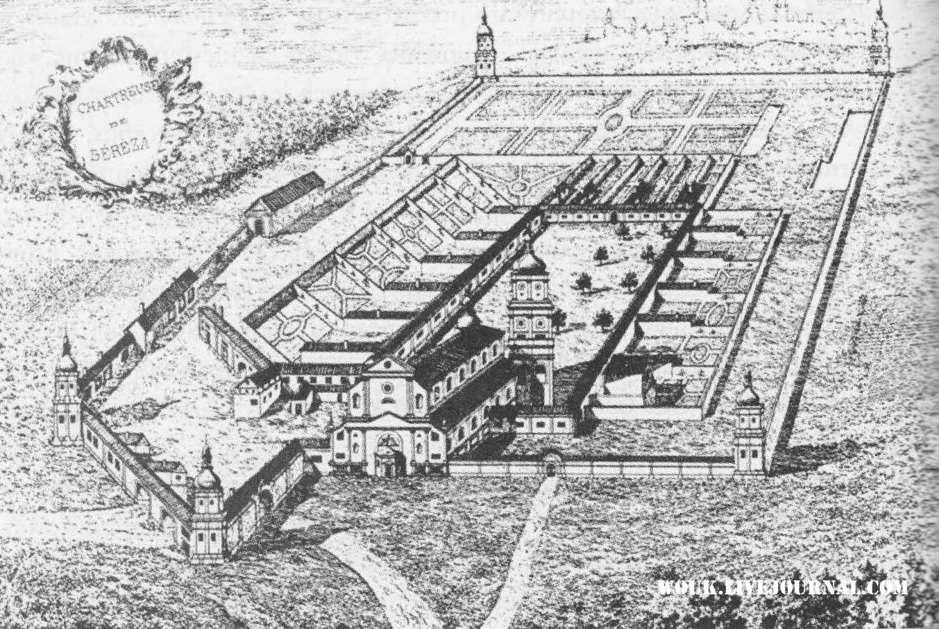 Беларуская (тарашкевіца): Бяроза Картуская (Biaroza Kartuskaja), кляштарны комплекс картузаў